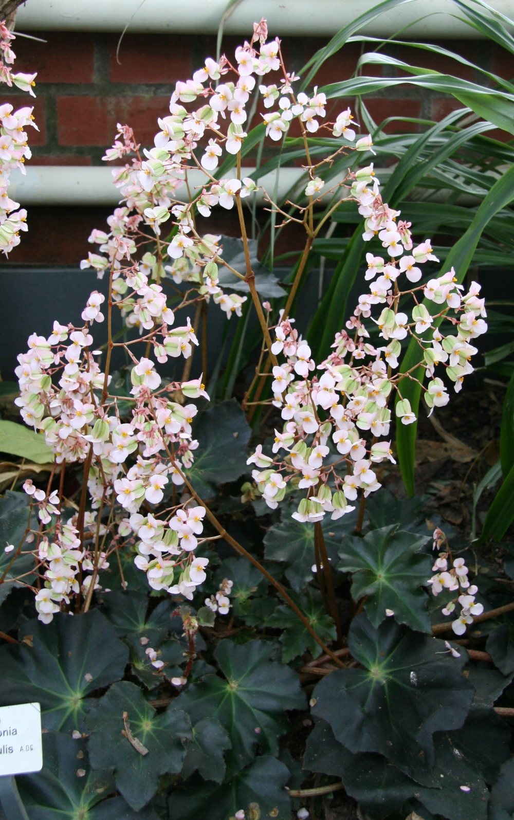 Begonia rhizocaulis im Botanischen Garten Dresden